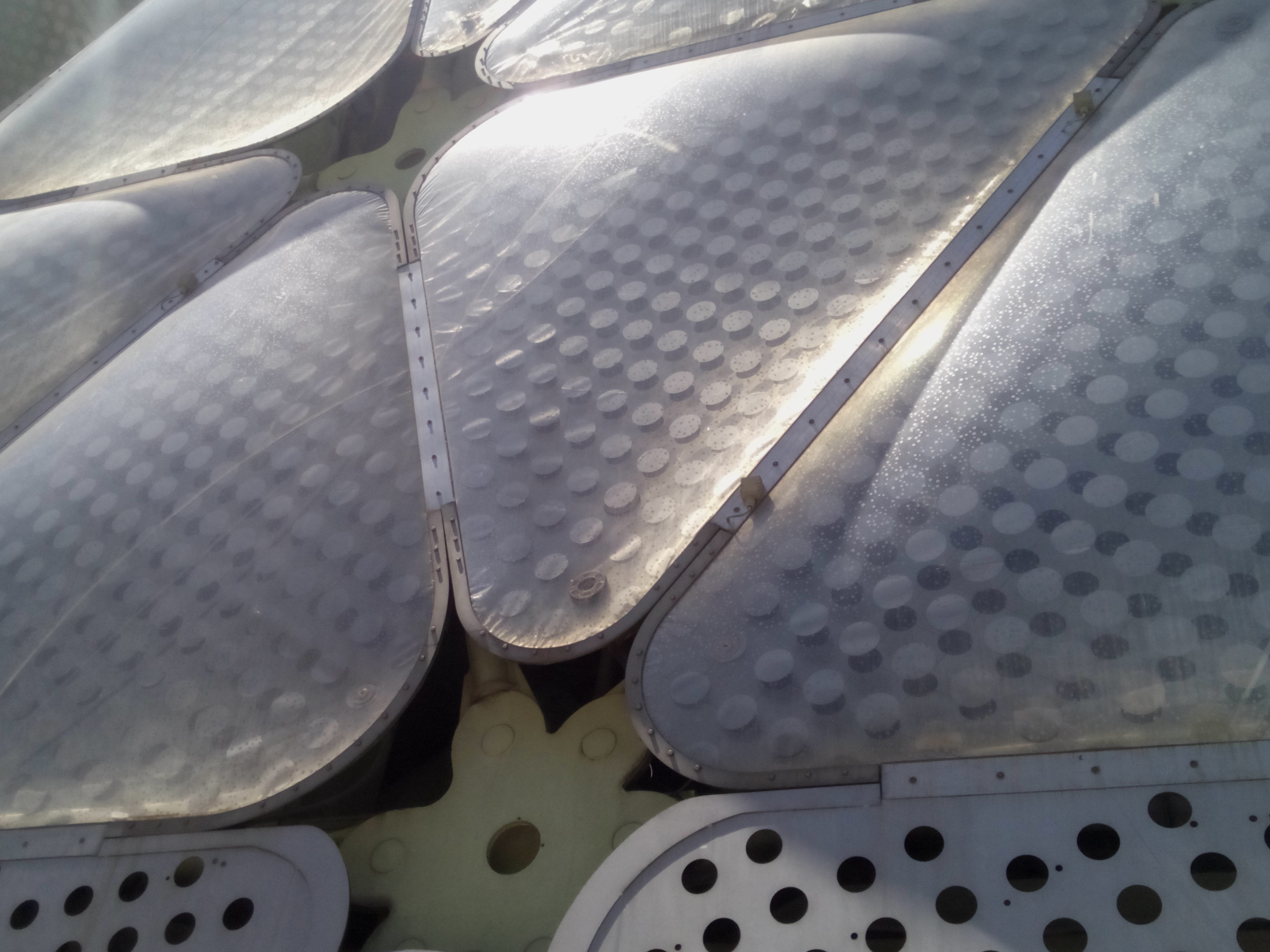 Detalle fachada sur-este del edificio media-tic. Se aprecia el patrón de diseño inverso en la capa central e interior de los cojines de EFTE